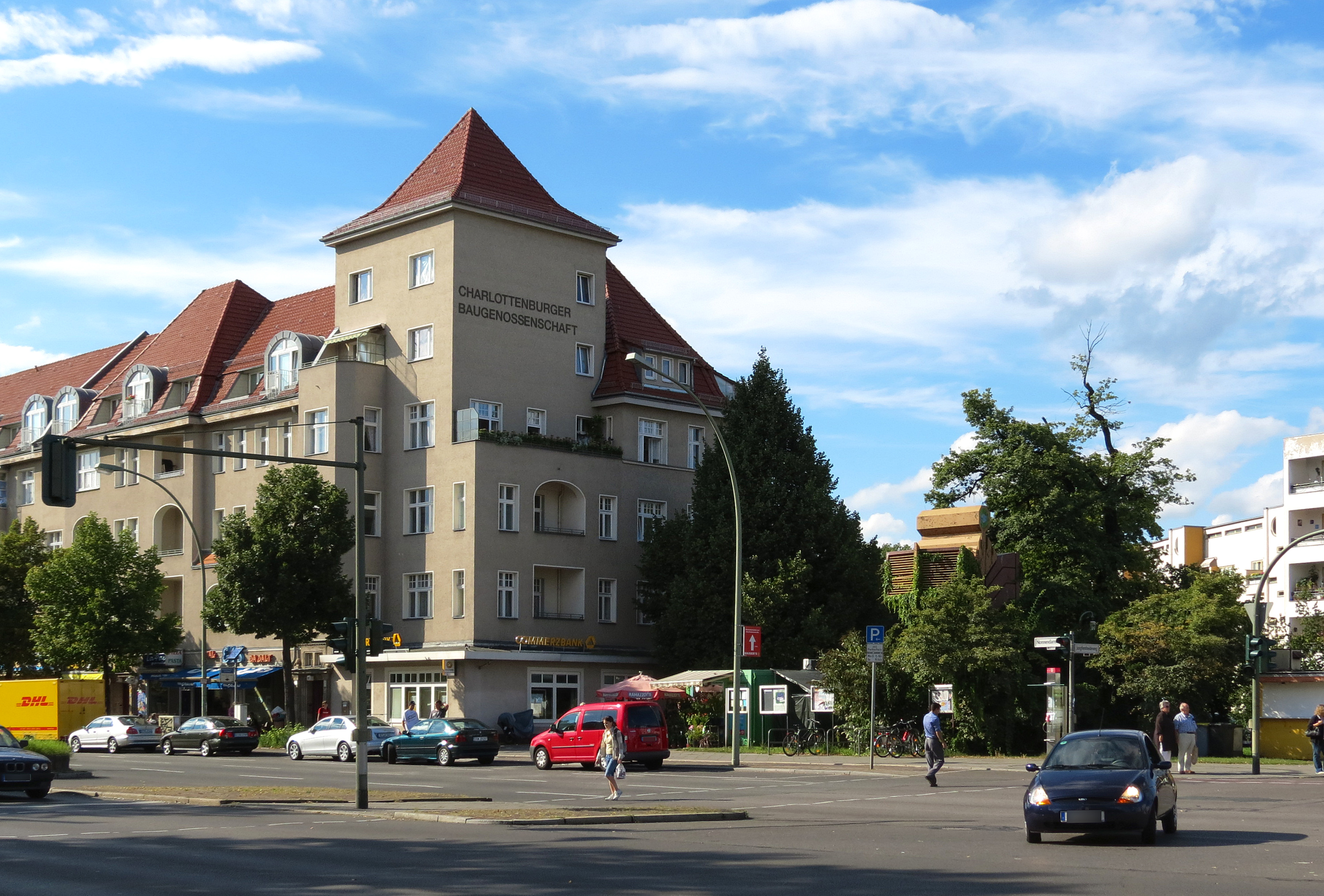 Kreuzung Nonnendammallee, Reisstraße und Jungfernheideweg, Wohnanlage Nonnendamm-Nord